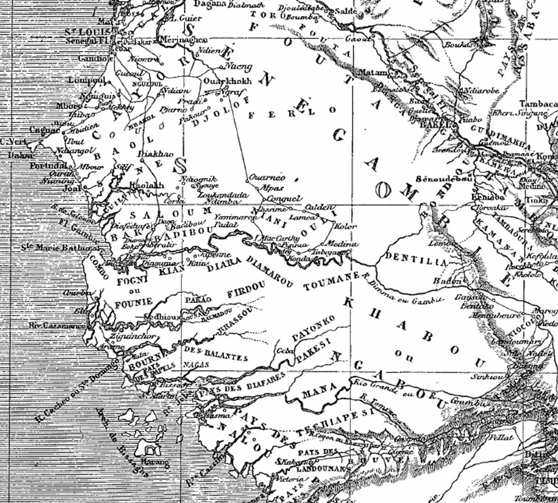 Extrait de la "Carte du voyage de Mr Mage de St-Louis à Ségou. Sénégambie.Niger", dans Voyage dans le Soudan occidental, p. 8 (Le Tour du monde : nouveau journal des voyages, sous la direction de Edouard Charton)